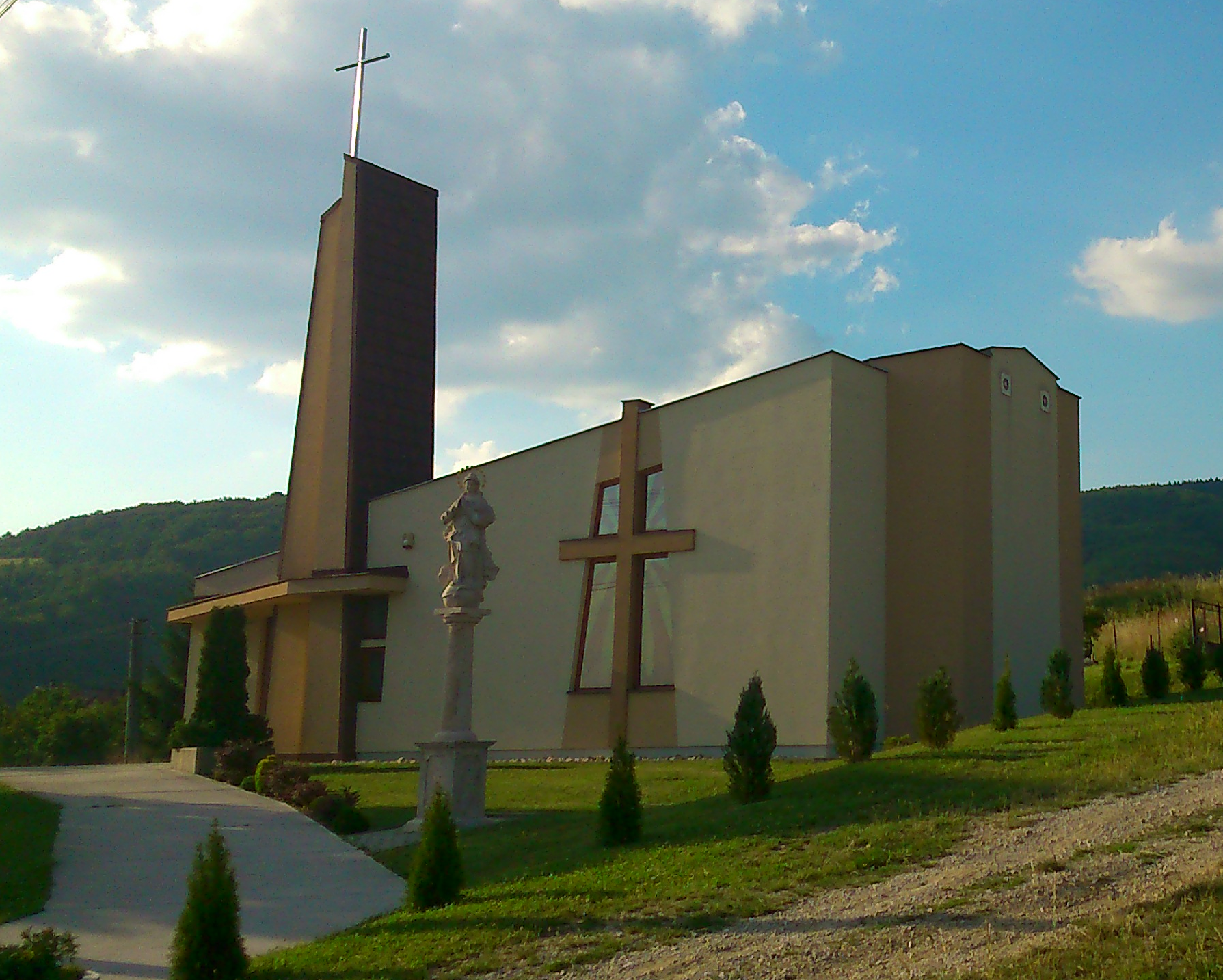 Kostol v Šutovciach